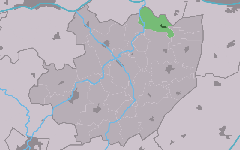 Kaartsje fan himrik fan Hilaard